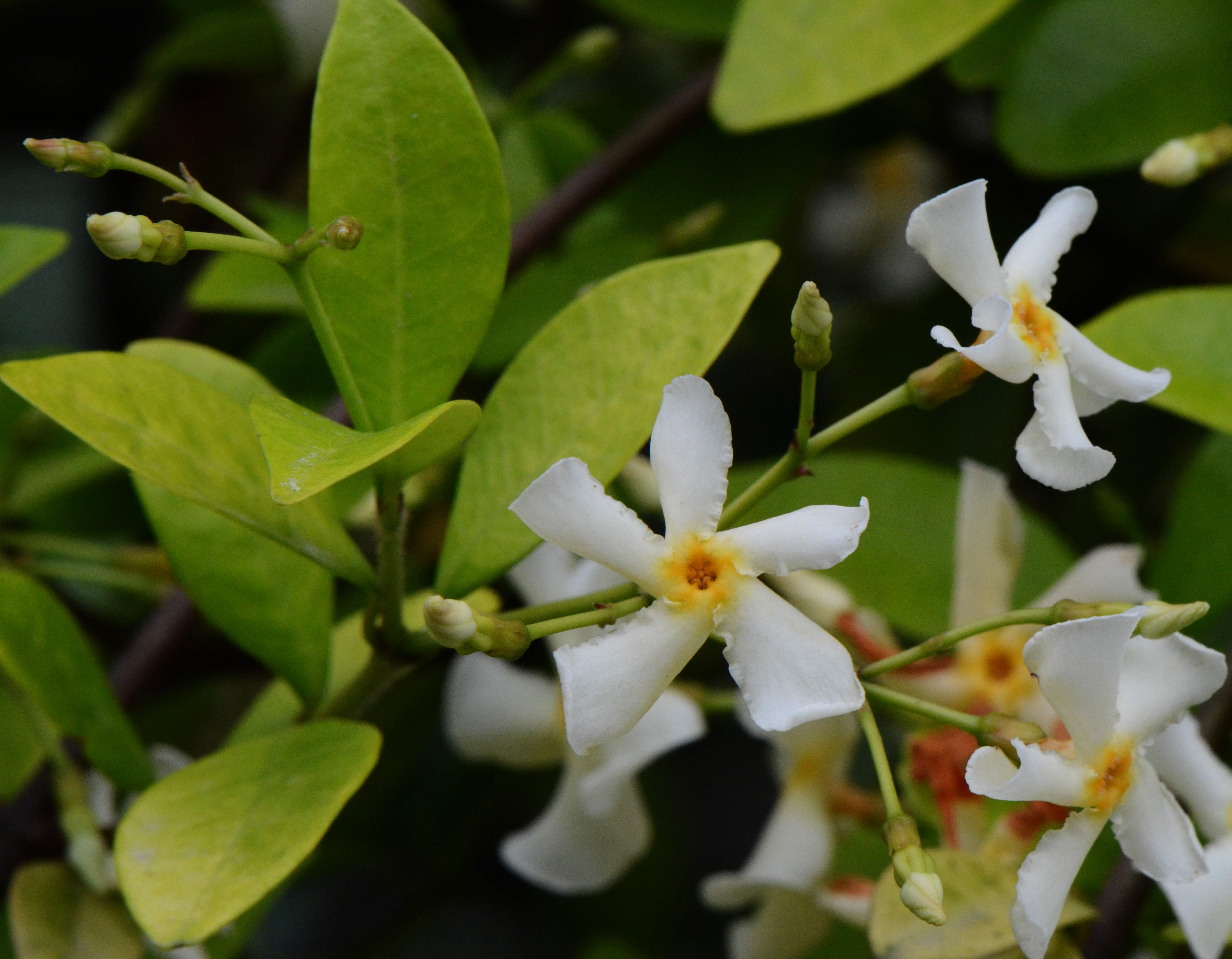 Trachelospermum asiaticum, Jardin des Plantes de Paris